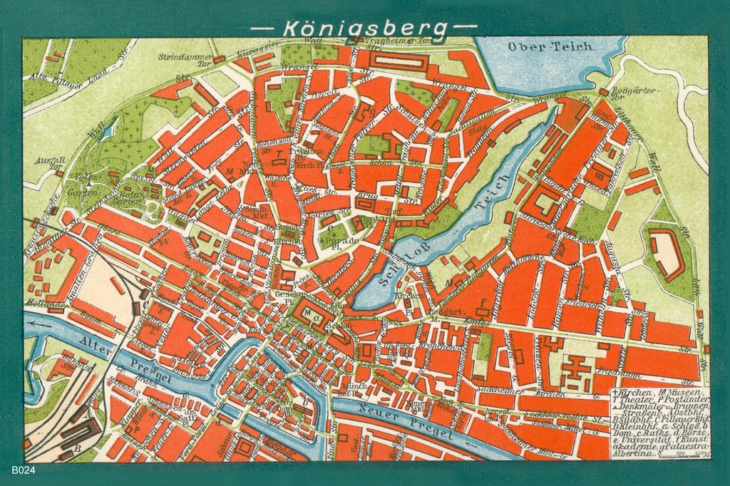 Königsberg